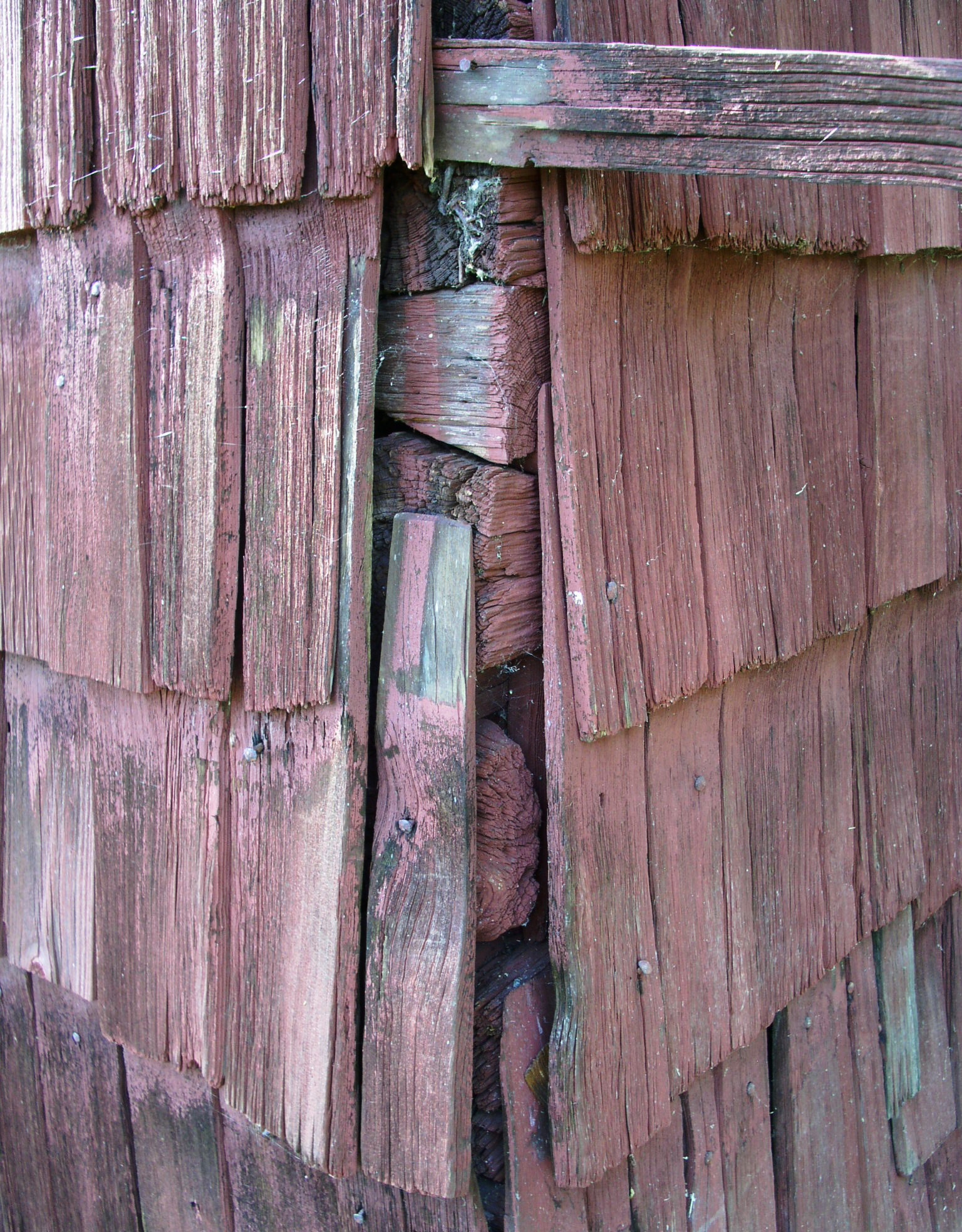 Laxknut (slätknut) i Kyrkboden i Ingatorp. Boden är daterad till 1229 (+/-10 år). För närvarande Sveriges äldsta daterade profana byggnad